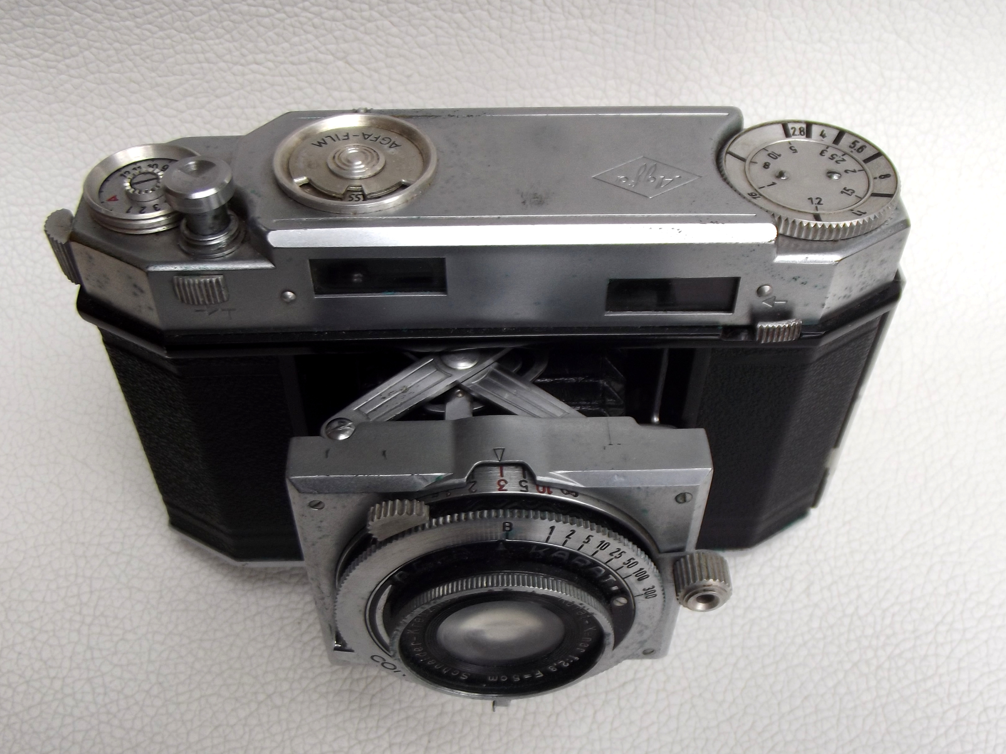 Agfa Karat 12, Ansicht von oben